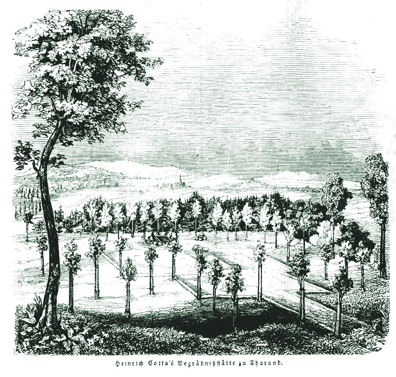 Tomb of Johann Heinrich Cotta (1763-1844), German forestry scientist, in Tharandt 1844. / Grabstätte Johann Heinrich Cottas, deutscher Forstwissenschaftler, in Tharandt 1844.